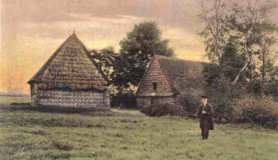 Hendrik Wilms bij de Wilms' boô aan de Europaweg te Nieuw-Schoonebeek.